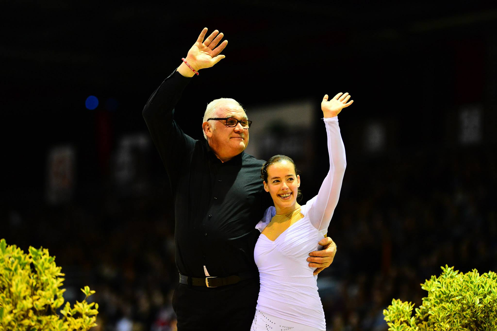 Anna e Nelson vincono la World Cup 2014 a Bordeaux